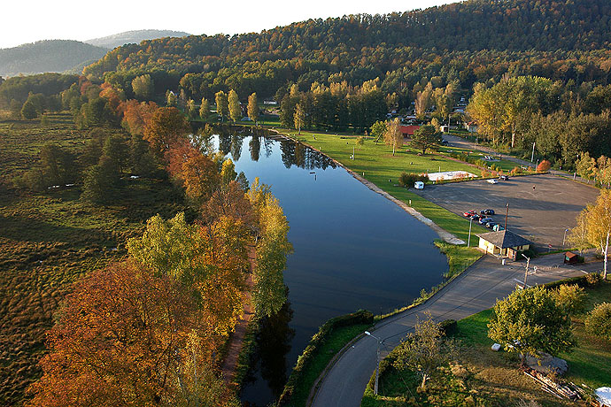 etang de baerenthal